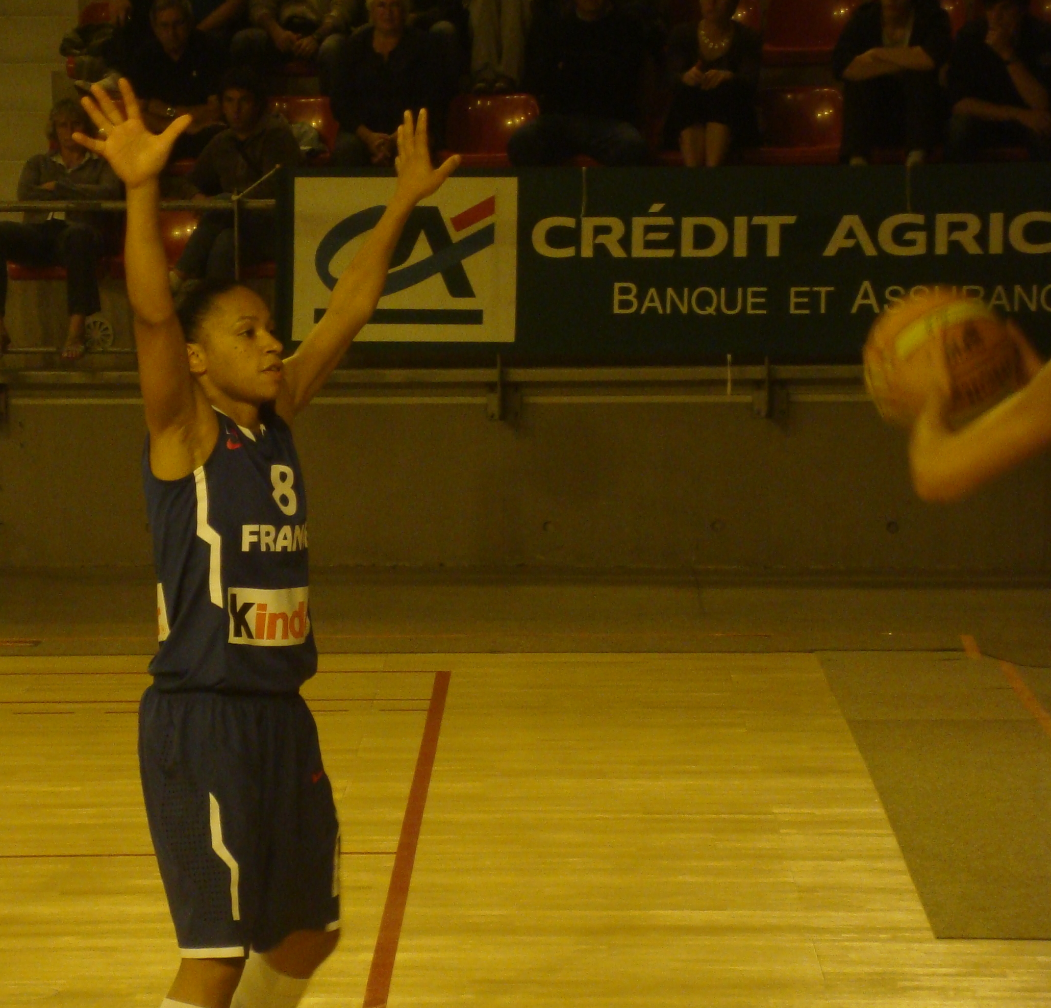 La basketteuse française Edwige Lawson-Wade